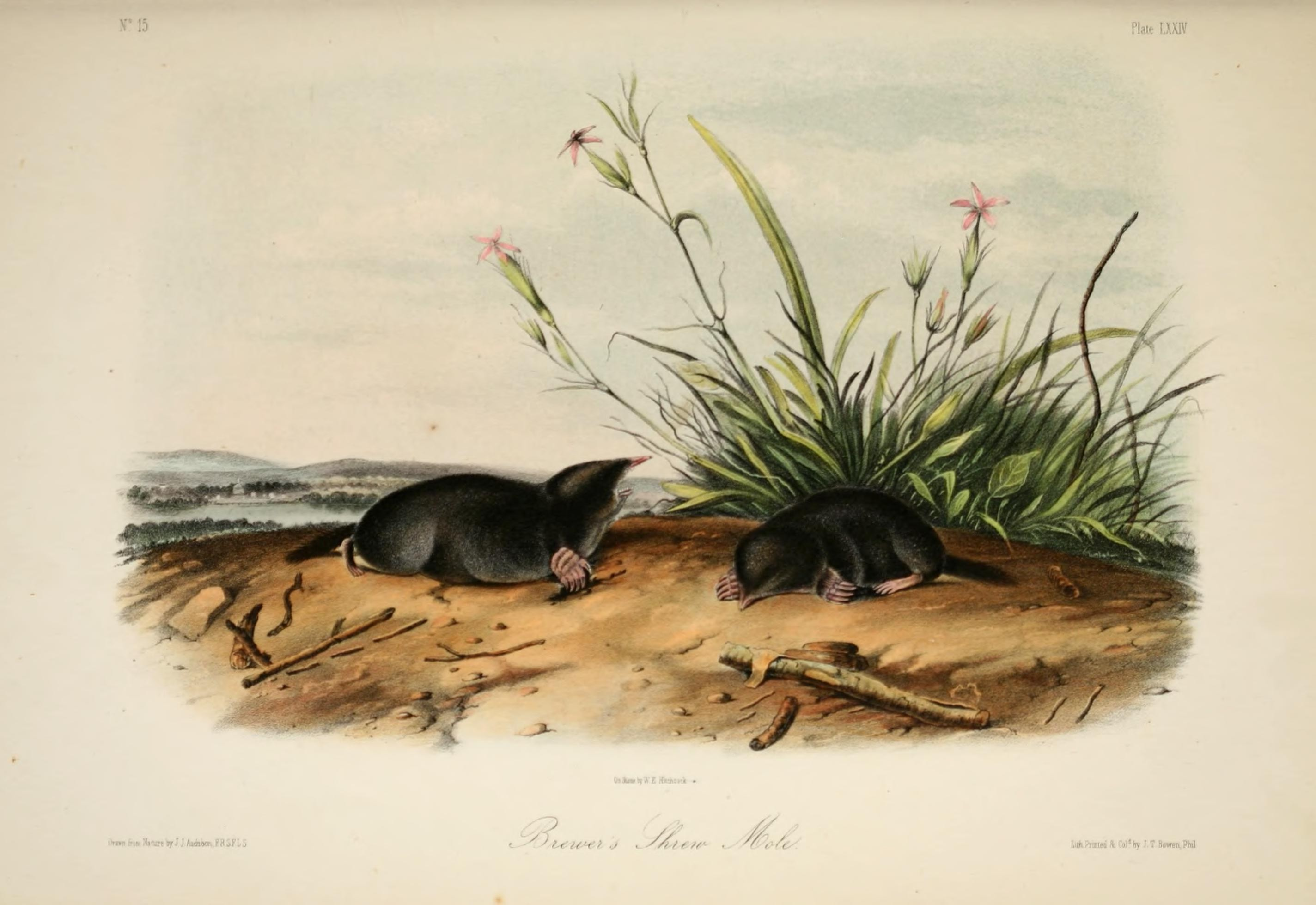 X